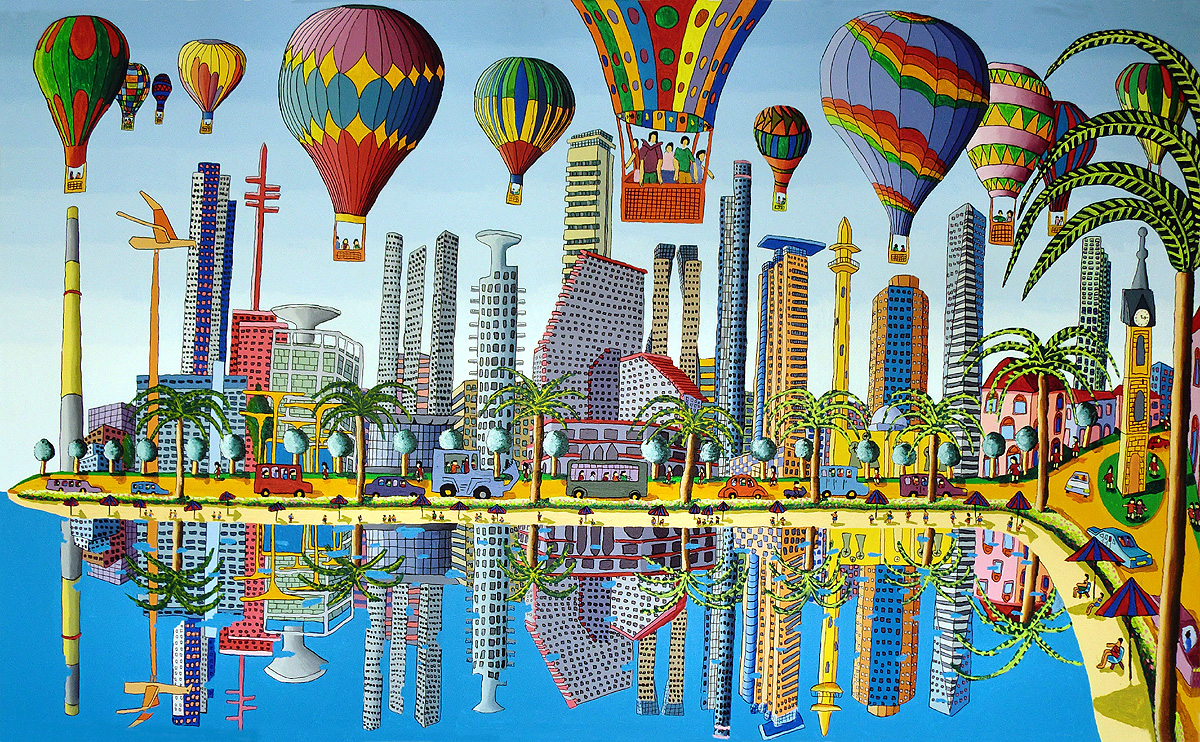 כדורים פורחים מעל הטיילת של תל אביב